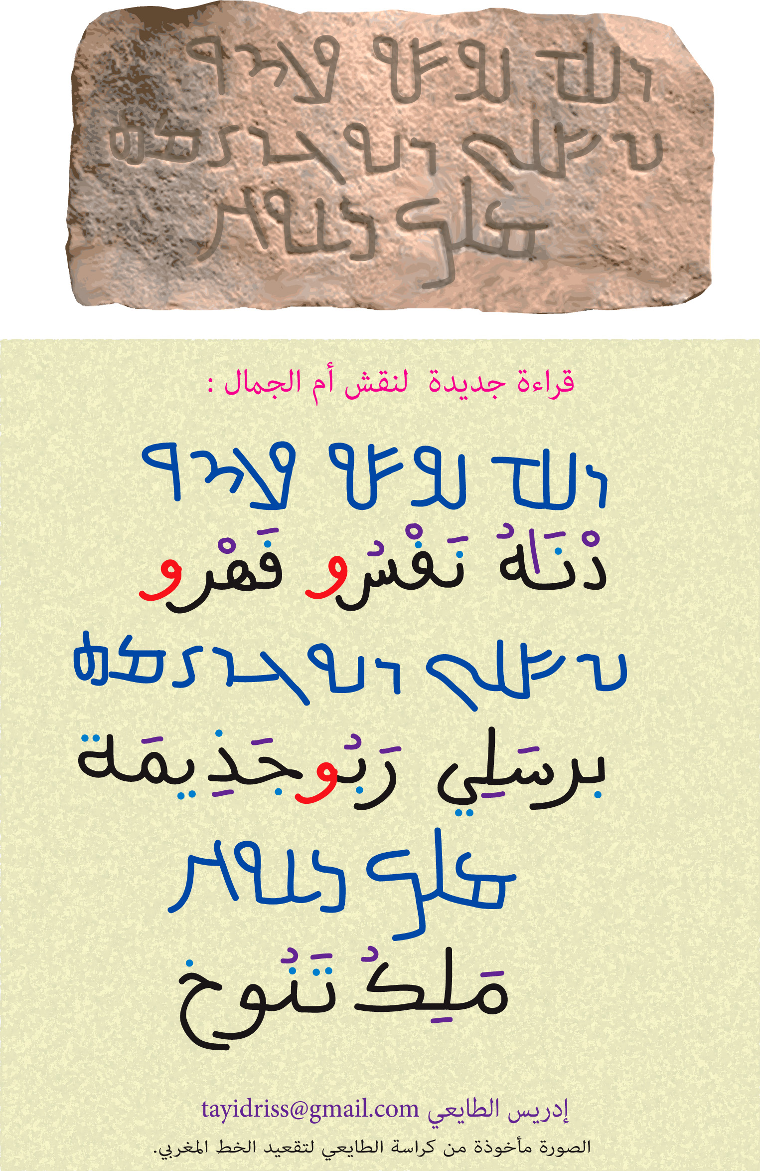 صورة يستفيد منها الباحثون الذين يهتمون بتاريخ الخط العربي وهي صورة أدرجتها في كراسة تقعيد الخط المغربي المبسوط لكتابة القرآن الكريم من تأليف : إدريس الطايعي